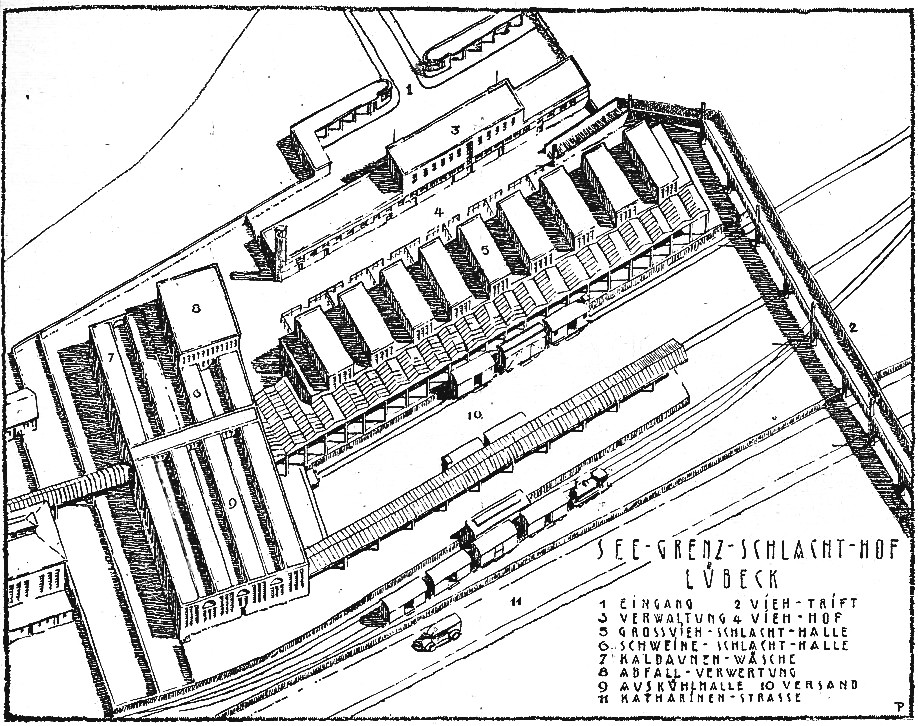 Lageplan des Seegrenzschlachthofs.